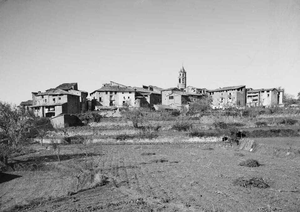 Imatge